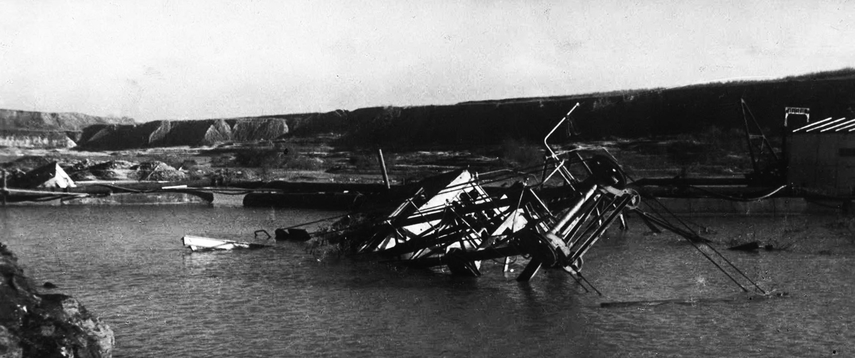 Затопленные и разрушенные многоковшовые экскаваторы горного разреза карьера Вальтер после 1945 года.